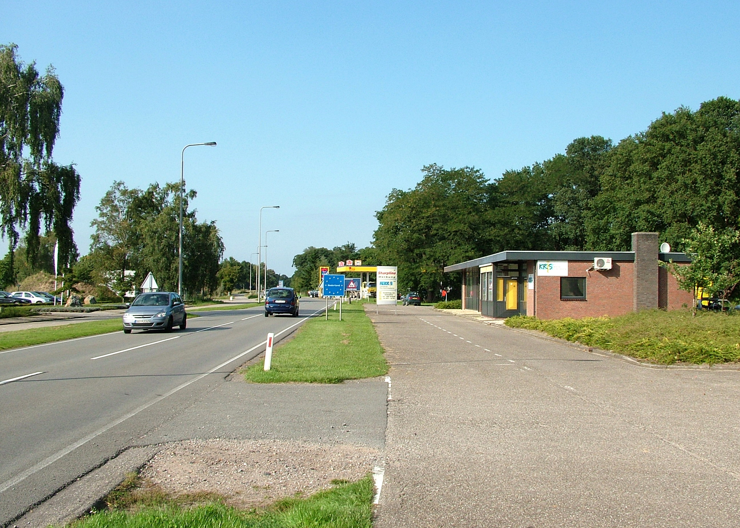 "Abraham" in Silvolde, Ost-Niederlande. Zum Anzeigen des 50. Geburtstag eines Mannes haben Freunde und Verwandte sein Haus mit einer Abraham-Puppe verziert.